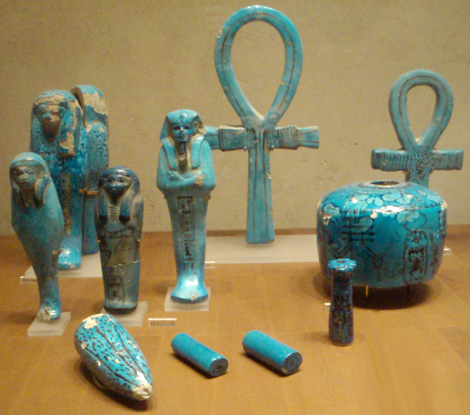 Fai